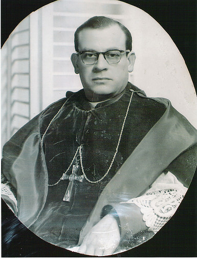 Mons. Lopez